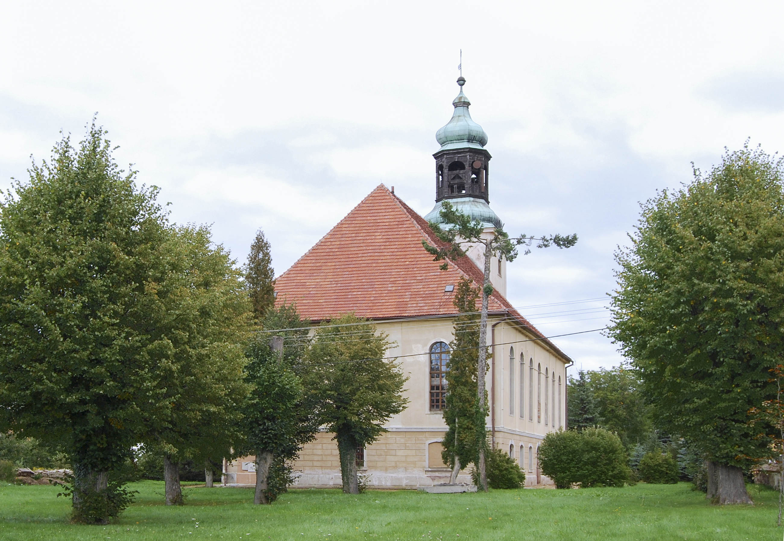 Kościół parafialny MB Ostrobramskiej i Najświętszego Serca Pana Jezusa, d. ewangelicki w Sosnówce, pow. jeleniogórski